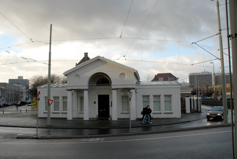 Het Paviljoen aan het Rijswijkseplein, tot 1933 tolhuis 'Het Wachtje'. Locatie: Rijswijkseplein, Stationsbuurt, Den Haag. Links het Huygenspark, rechts het Zieken